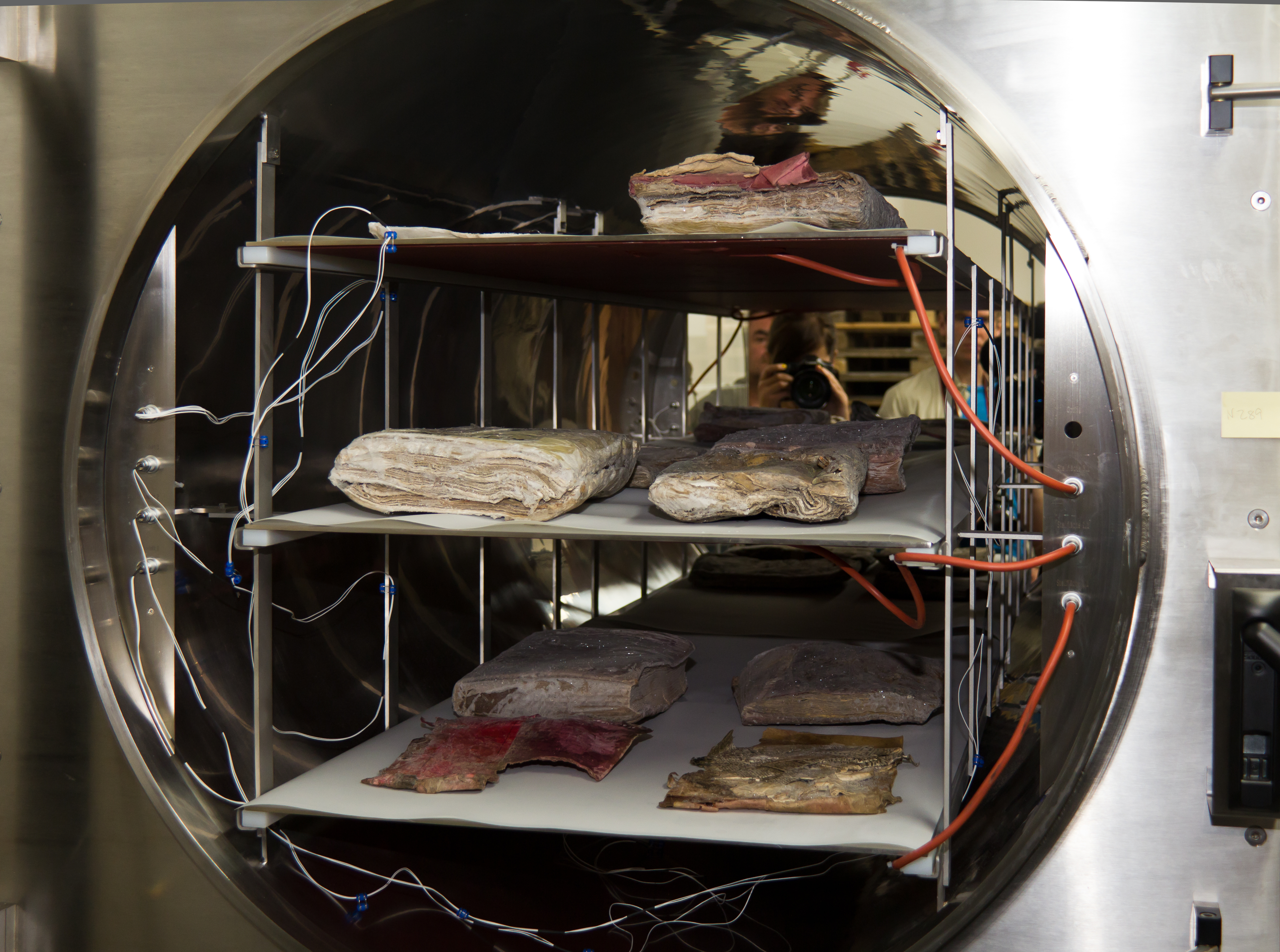 Pressetermin zur Inbetriebnahme der Gefriertrocknungsanlage im Restaurierungs- und Digitalisierungszentrum des Historischen Archivs der Stadt Köln. Die Gefriertrocknungsanlage wird mit schockgefrorenem Archivgut befüllt.